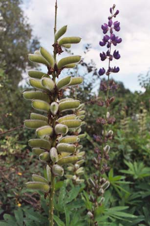 Bild på Lupiner tagen i Sverige.